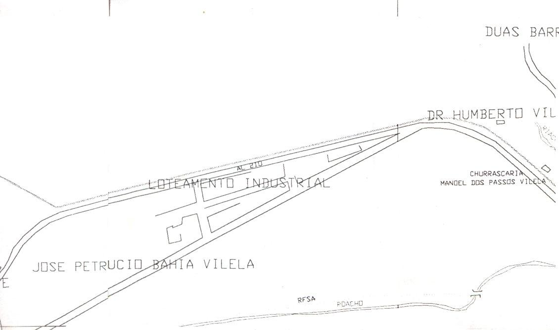 Distrito Industrial de Viçosa-AL